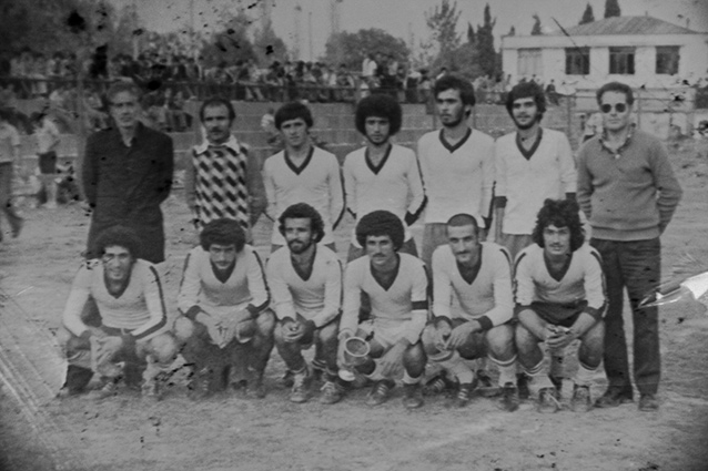 تیم نساجی قائمشهر پیش از انقلاب اسلامی. بازیکنی که کاپ را در دست دارد کاپیتان وقت تیم علی اکبر نیکویی است.